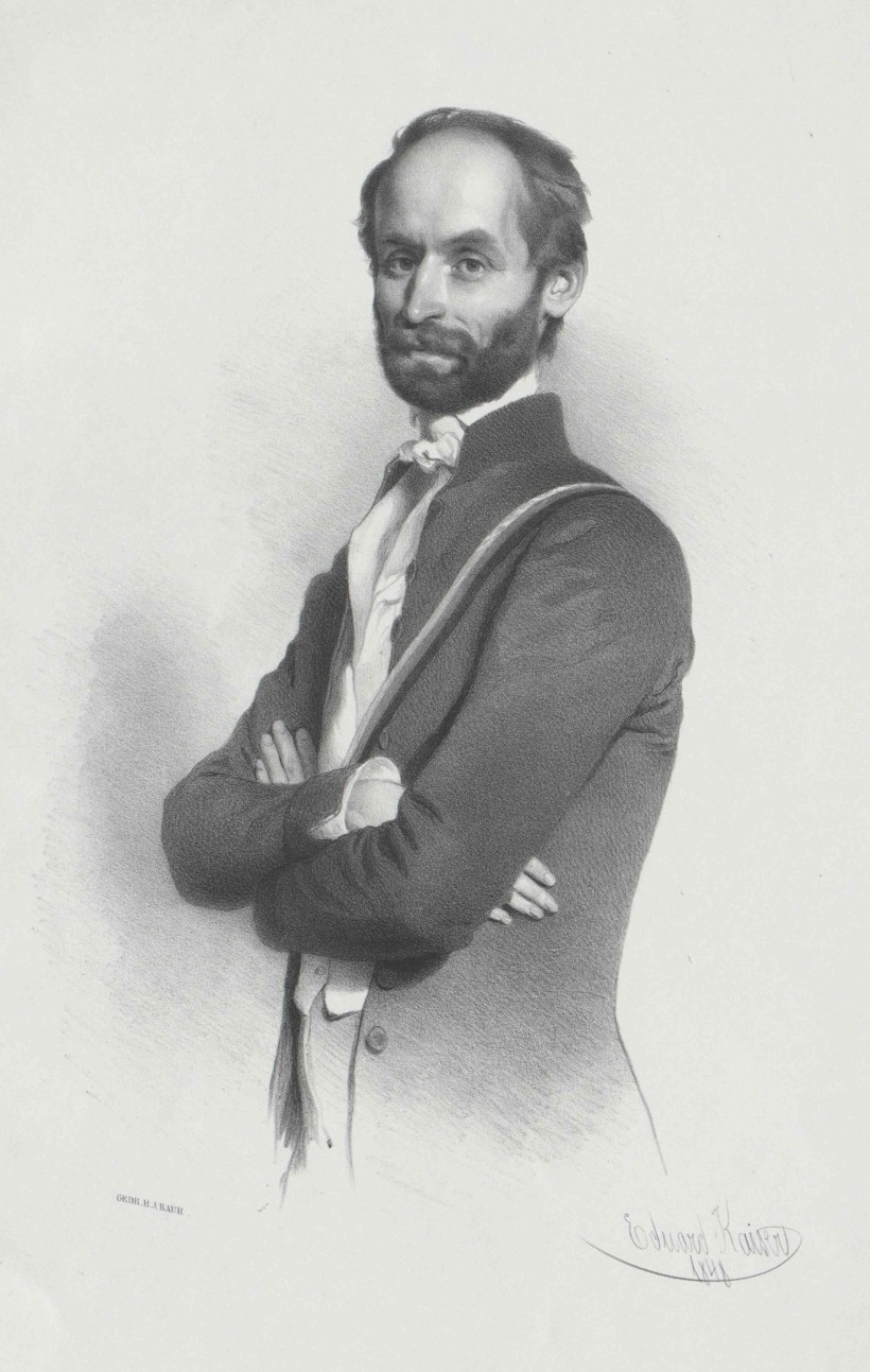 Ludwig von Löhner (1812 - 1952), Český a rakouský politik.